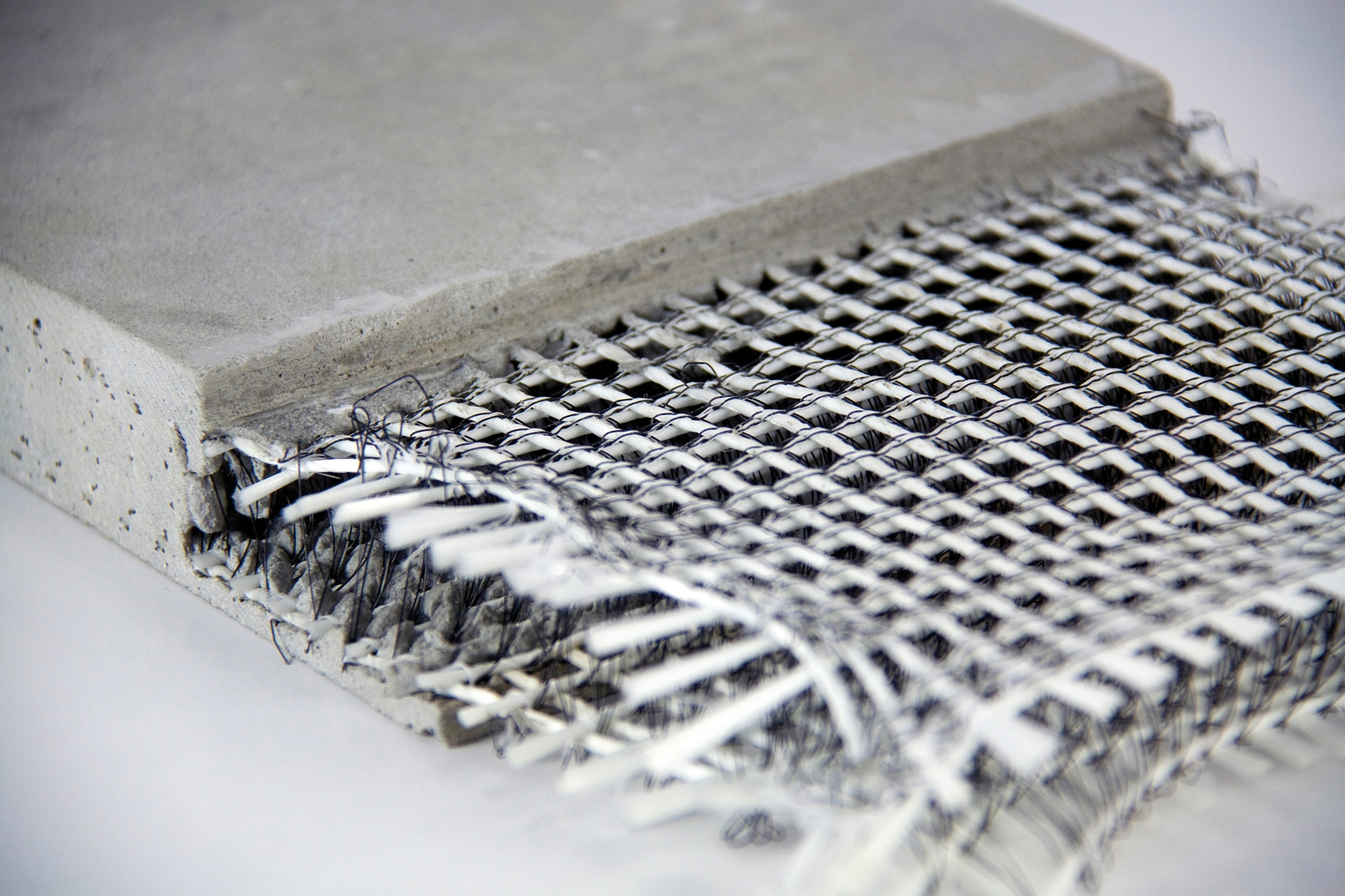 Textilbewehrung in Beton